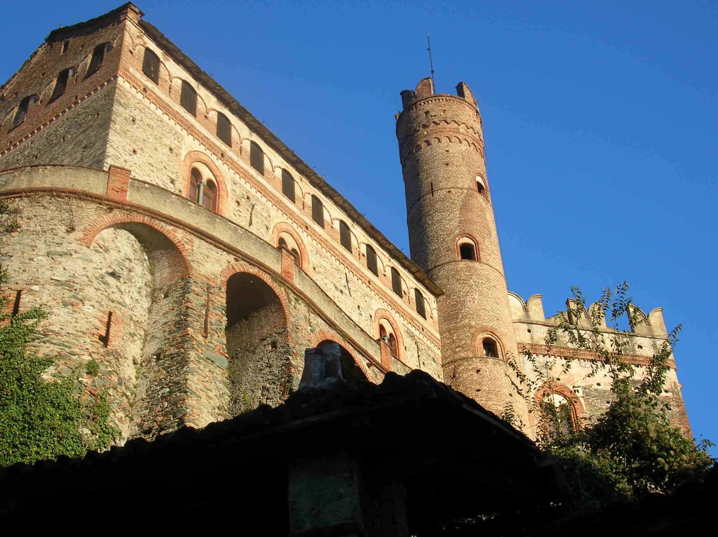 Castello di Villar dora dei Conti Antonielli d'oulx